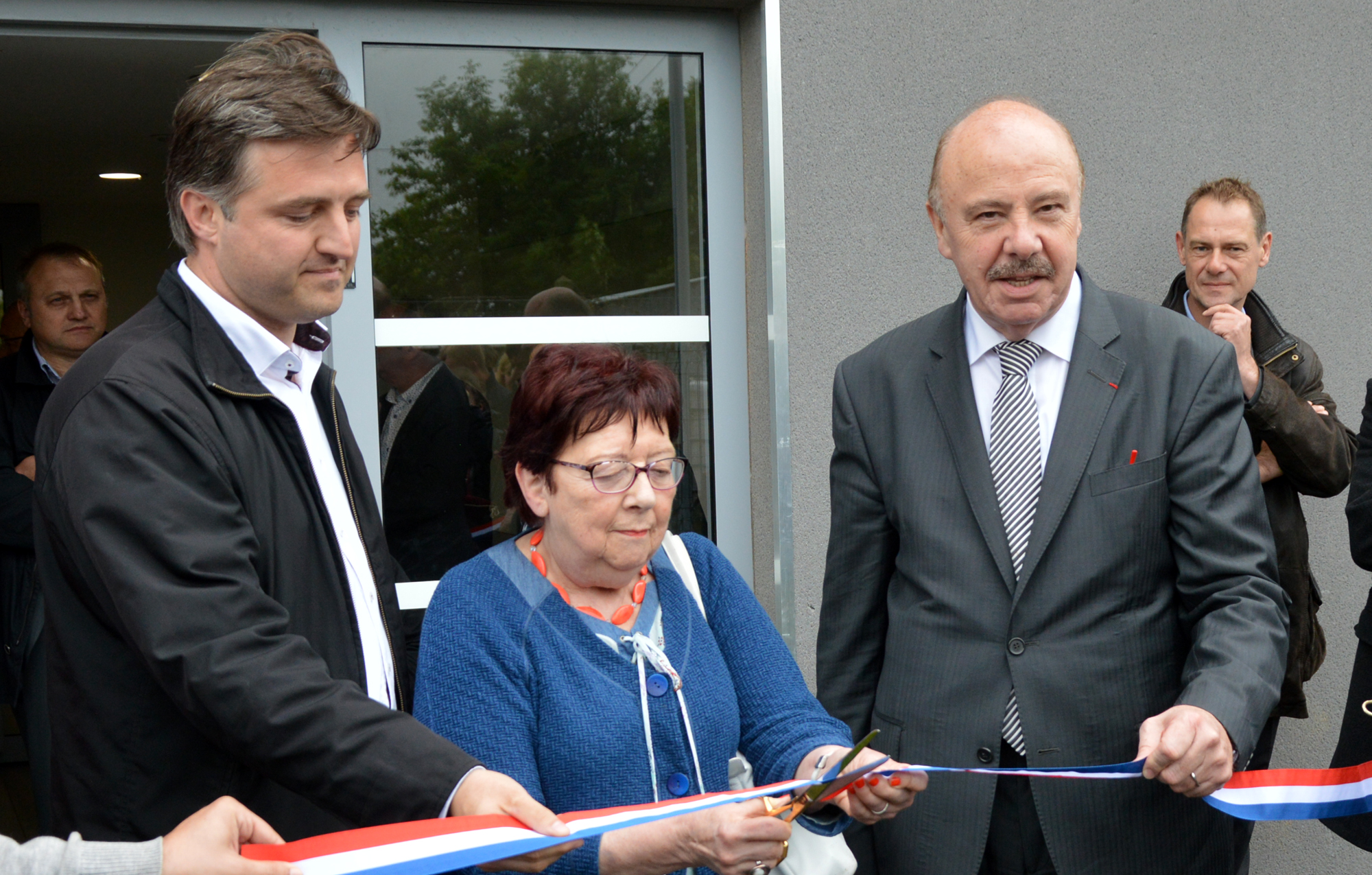 Alain Gest (à droite) lors d'une inauguration à Longueau le 20 juin 2016 avec Mme Colette Finet (Maire de Longueau) et Jean-Christophe Loric (Président de l'OPAC d'Amiens et 4ème adjoint au maire délégué à l’Urbanisme et au Logement pour tous.